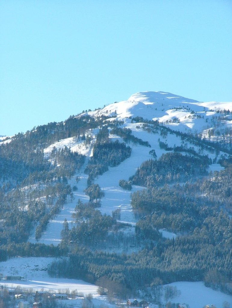 Sæterlia - Surnadal alpinsenter